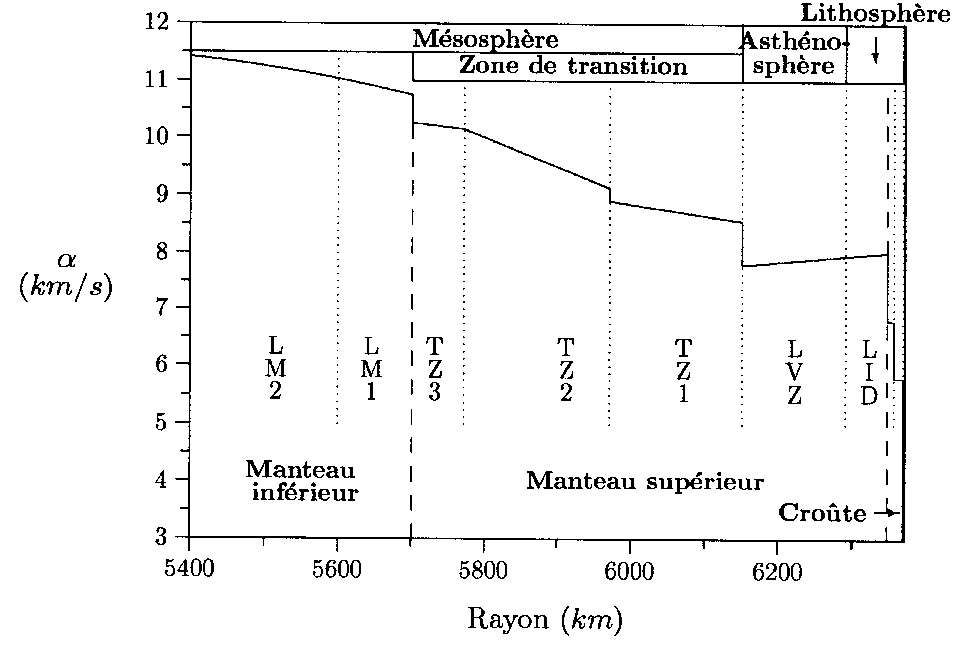 Subdivisions de la croûte et du manteau supérieur dans le modèle PREM.